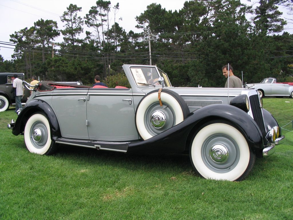 Horch 930V Phaeton Baujahr 1939, fotografiert von Ramgeis in Pebble Beach, Kalifornien im August 2004, GNU-FDL first upload in de wikipedia on 05:18, 17. Okt 2004 by Ramgeis